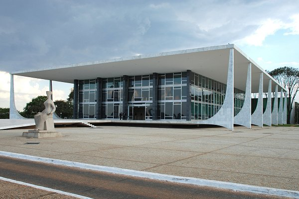 Brasilia, Cour Suprême de Justice fédérale du Brésil